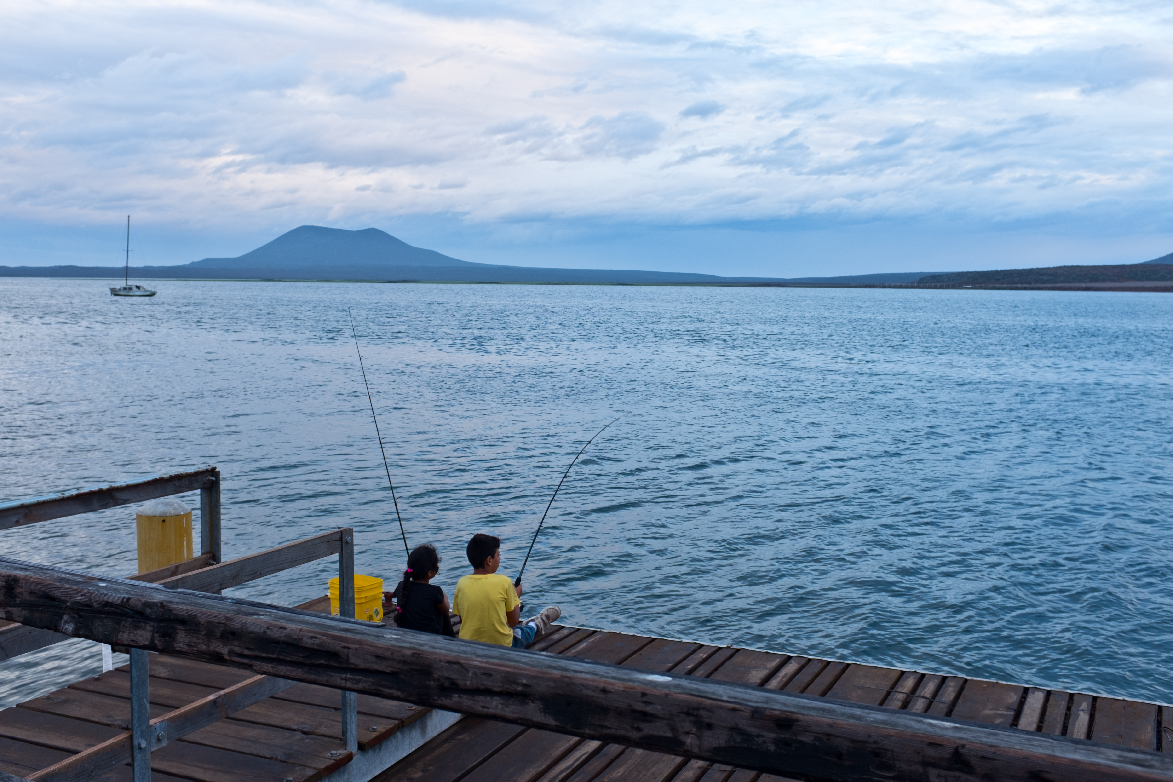 Niños pescando en la bahía de San Quintín, BC, México